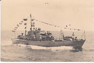 ספינת משמר אח"י דרור